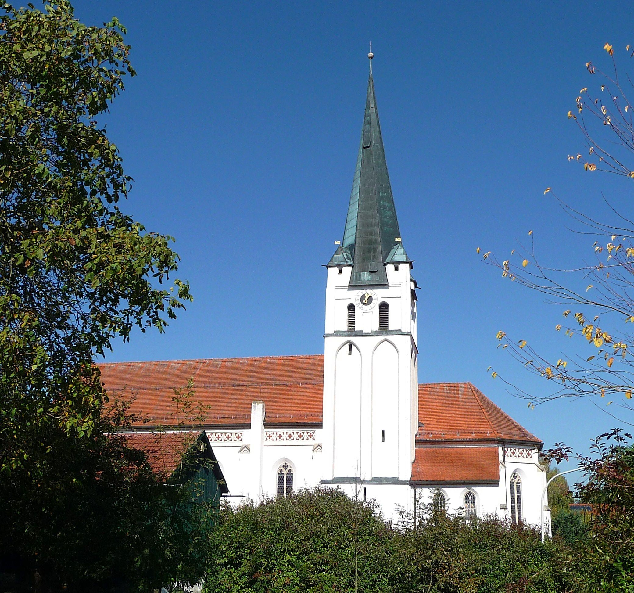 Die Pfarrkirche St. Georg in Ast